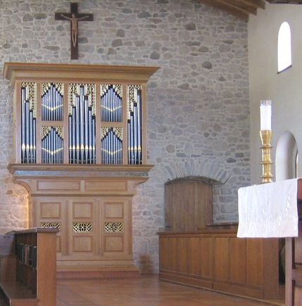 Orgue de l'abbaye bénédicitne Notre Dame du Pesquié (Ariège), construit par Jean Daldosso en 1997.